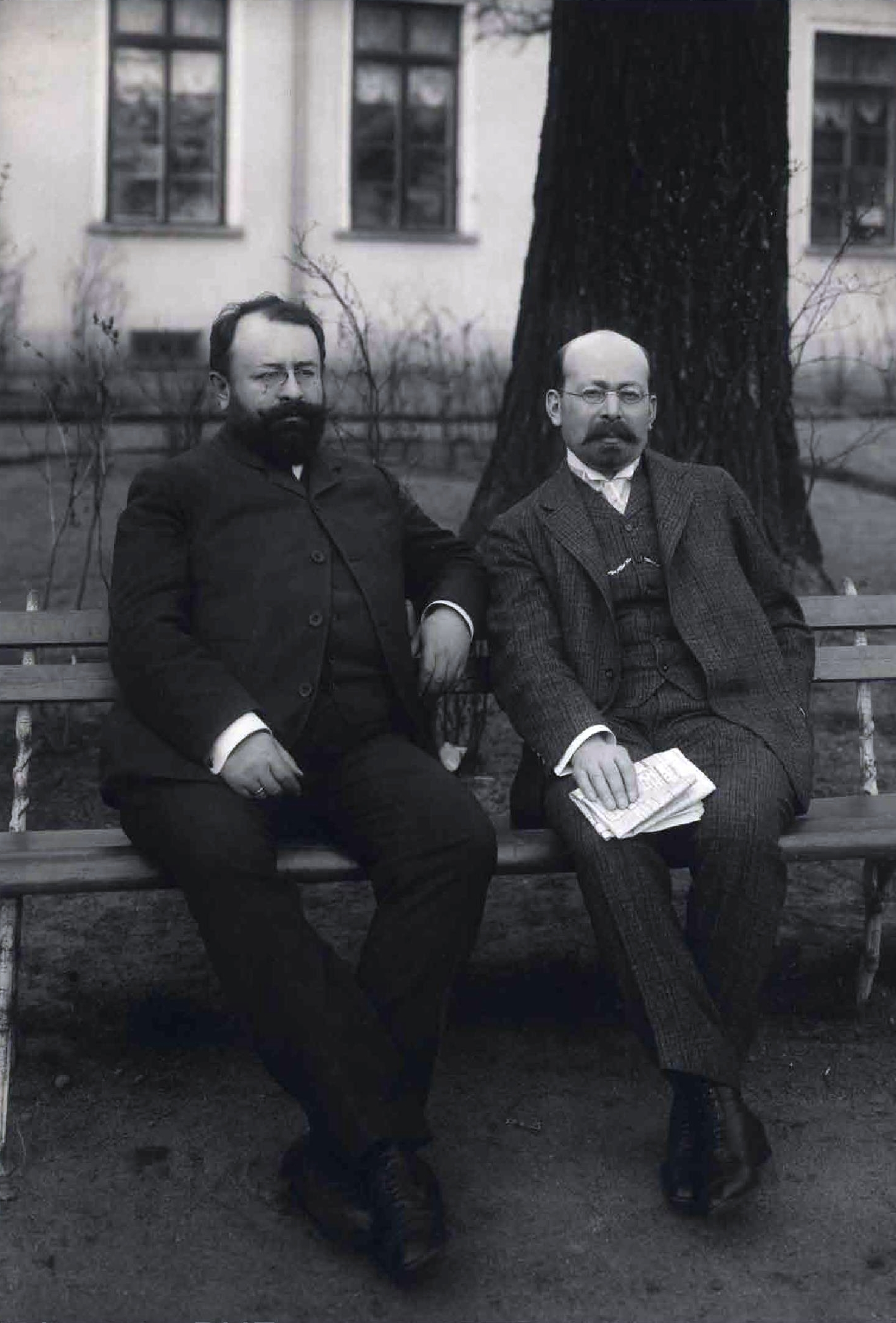 Депутаты II Государственной думы Российской империи Гессен Владимир Матвеевич и Гессен Иосиф Владимирович